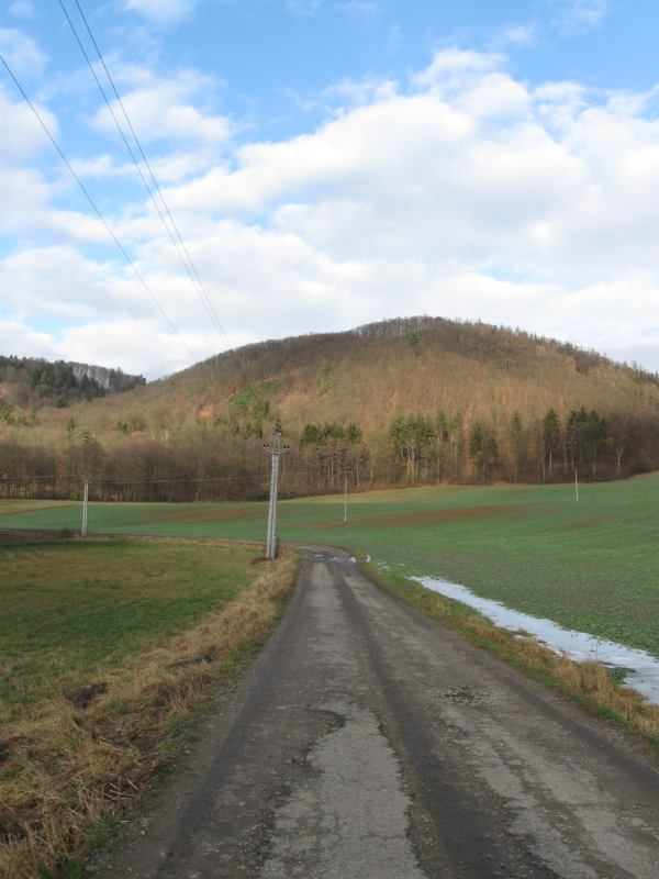 Rakovecké údolí - v pozadí kopec se keltským hradiskem Černov